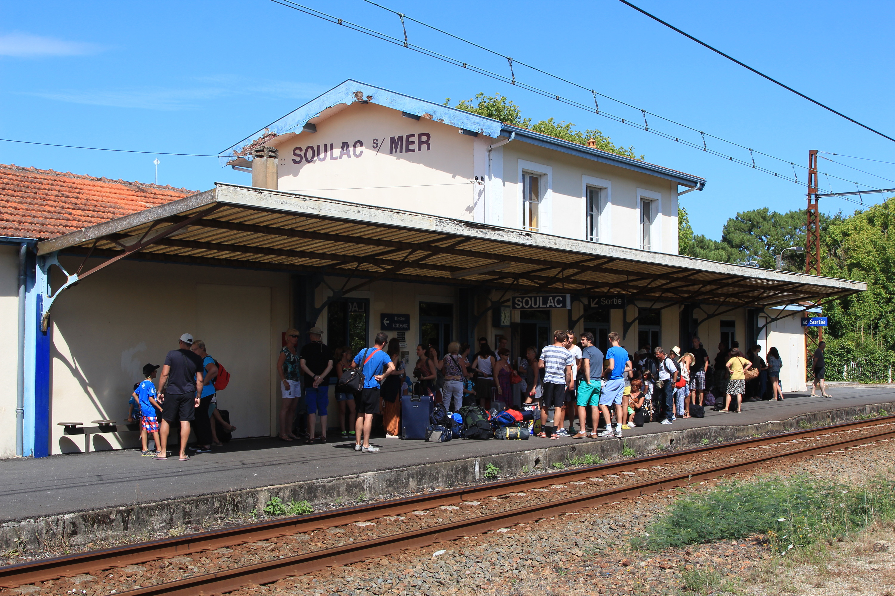 Bâtiment voyageurs de la gare de Soulac-sur-Mer vu côté quai et voie, avec une forte affluence sur le quai.